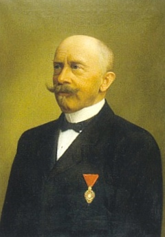 Franz Khemeter portrét, Friedrich Wutschl, 1905